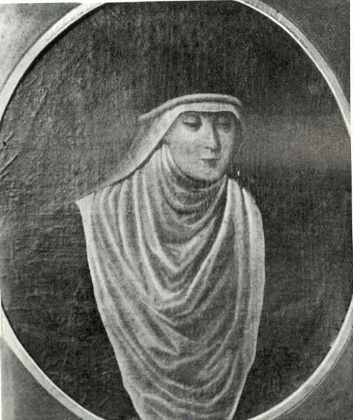 Портрет, Ельжбета Луція Сенявська